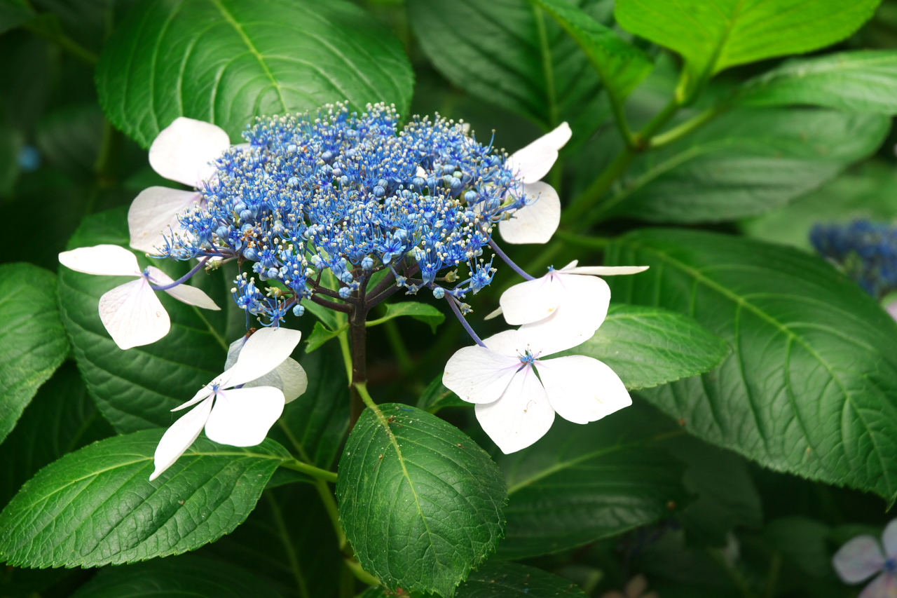 下田公園のあじさい。